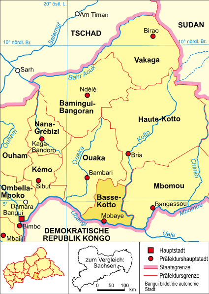 politische Karte der Zentralafrikanischen Republik (Präfektur Basse-Kotto hervorgehoben)